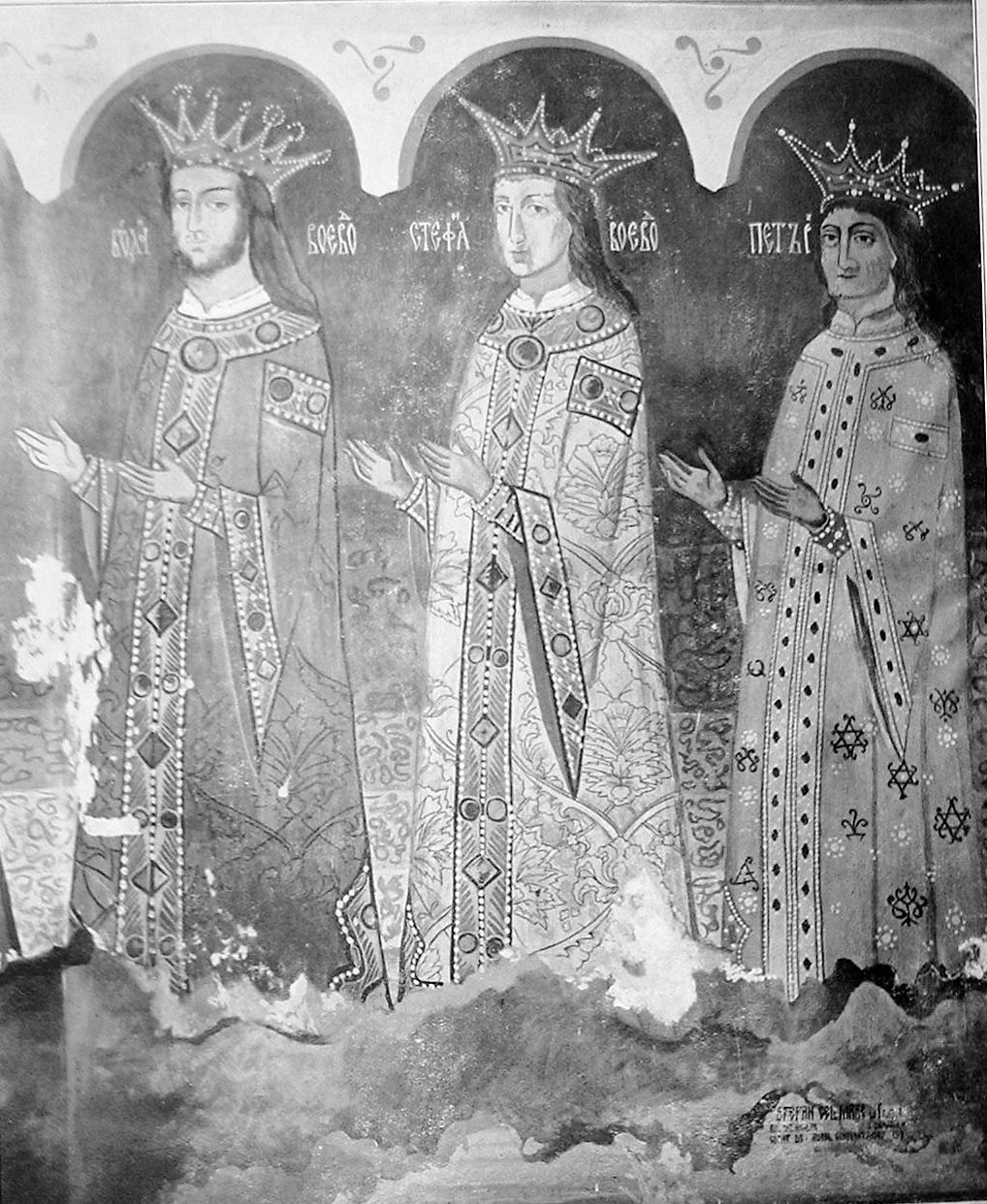 Bogdan cel Orb, Stefan cel Tânăr and Petru Rareş in St Nicholas church, Dorohoi